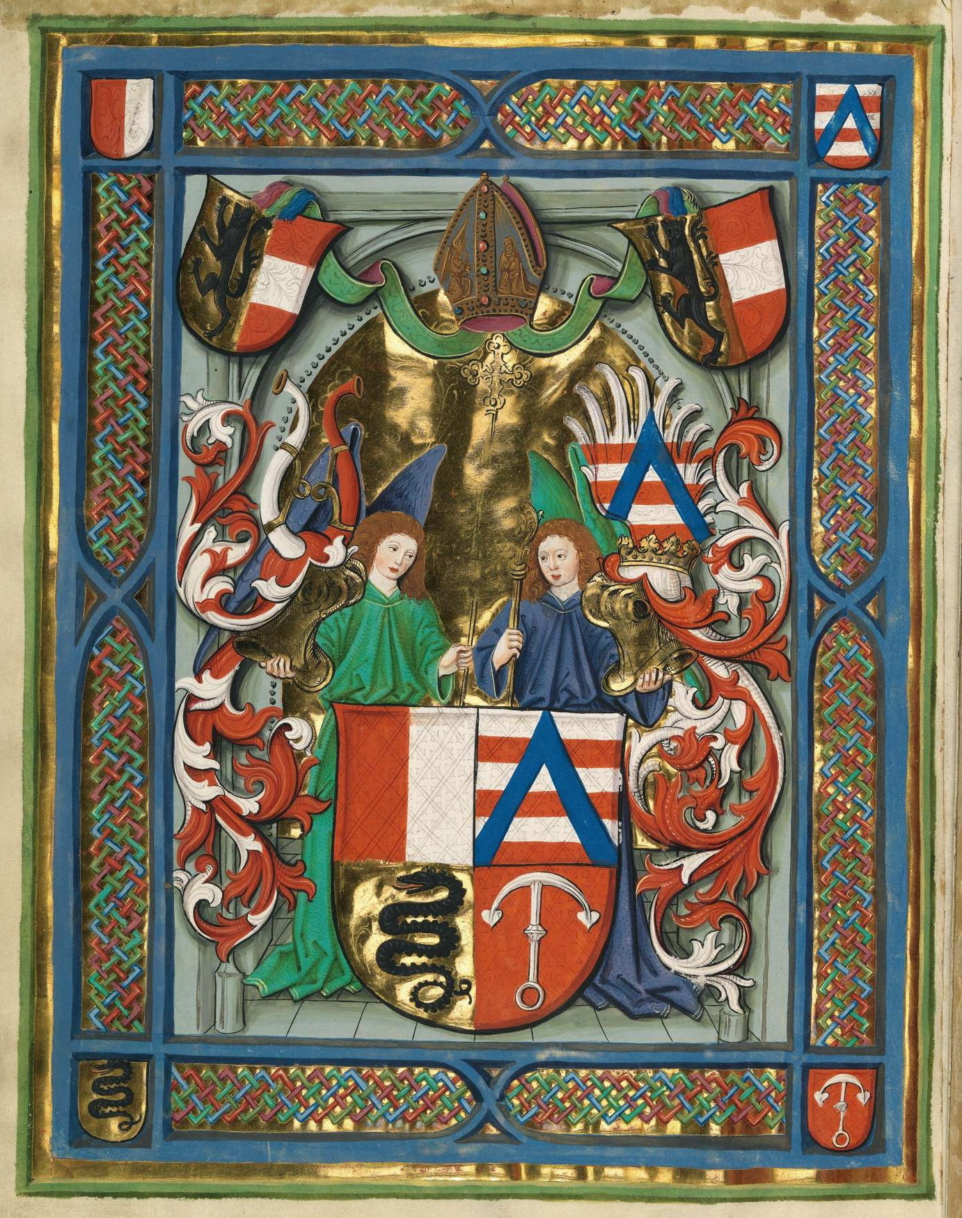 Wappen des Salzburger Erzbischofs Friedrich Graf von Schaunberg